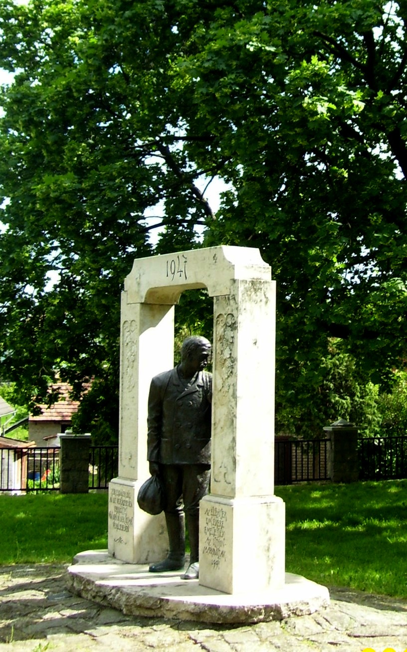 Dunabogdányi emlékmű a sváb kitelepítetteknek, állítva az 50. évfordulóra